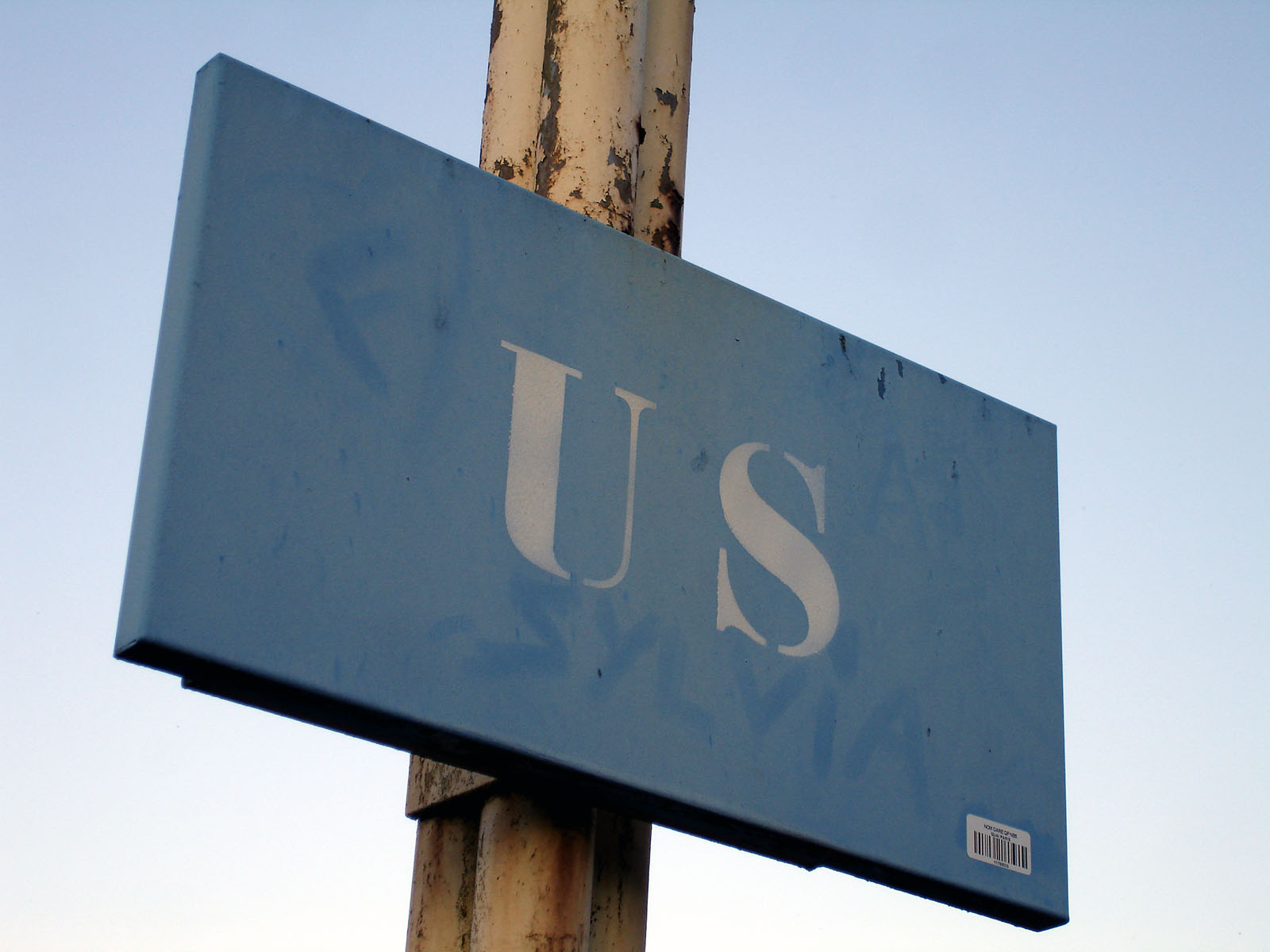 La gare d'Us, Val-d'Oise, France.